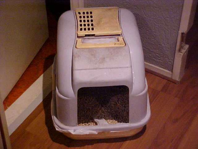 Kattenbak